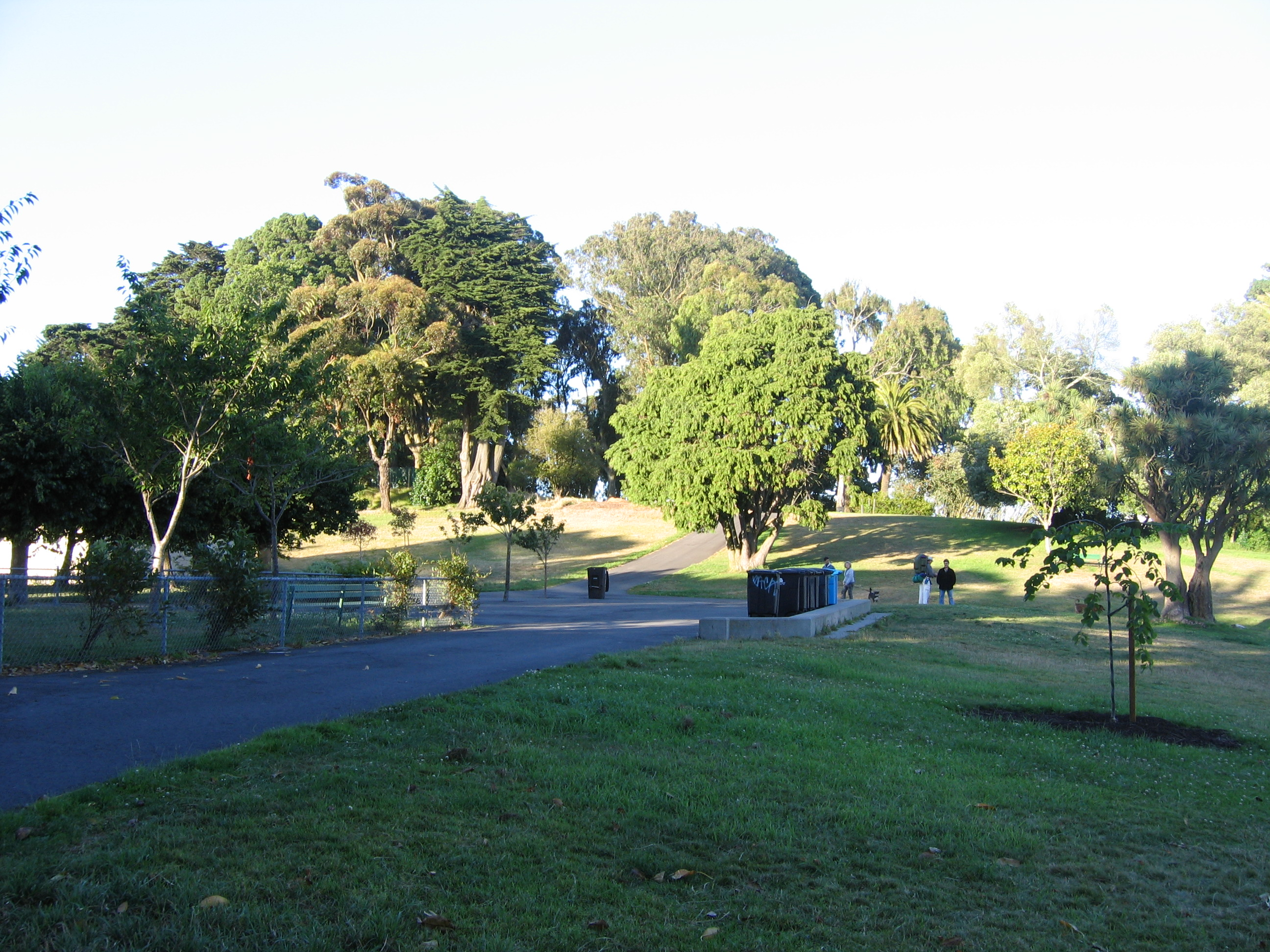 Лафайет парк в Сан Франциско, Калифорния, САЩ.